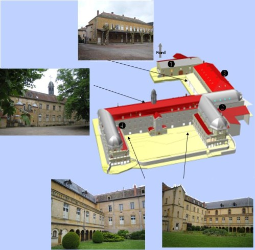 Utilisation des bâtiments, plan moderne